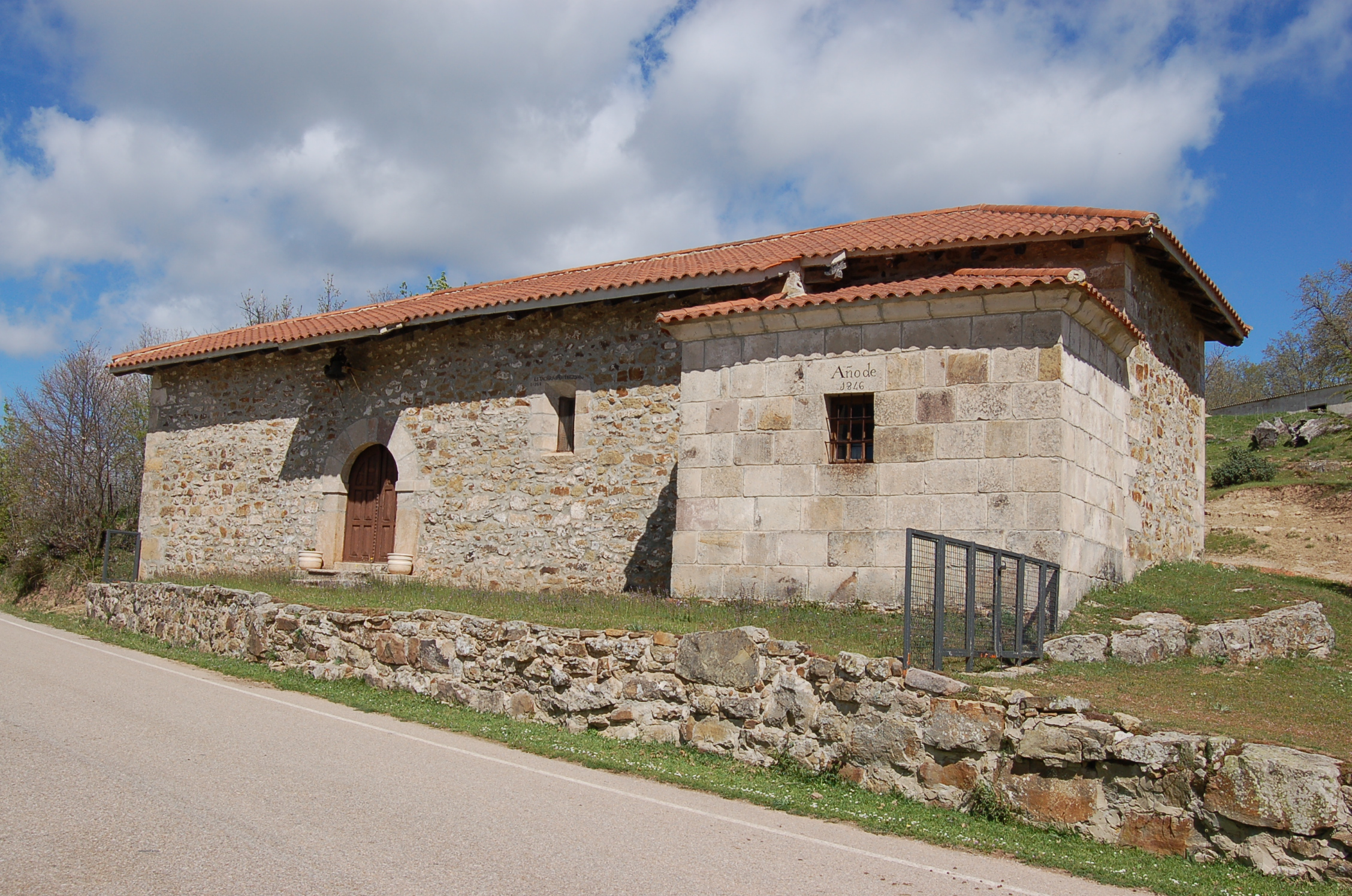 Ermita de los santos Cosme e Damián en Monasterio de la Sierra